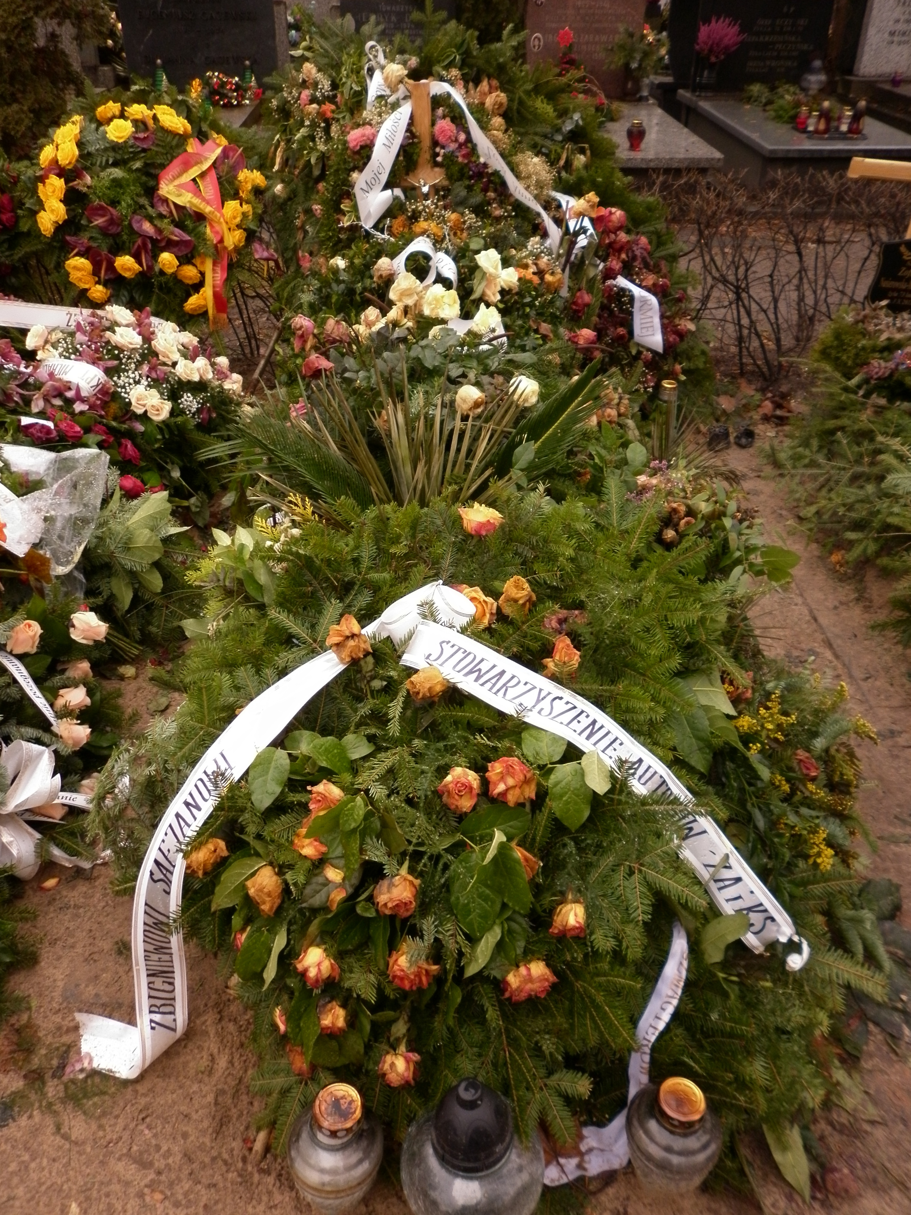 Grób Zbigniewa Safjana na Cmentarzu Wojskowym na Powązkach